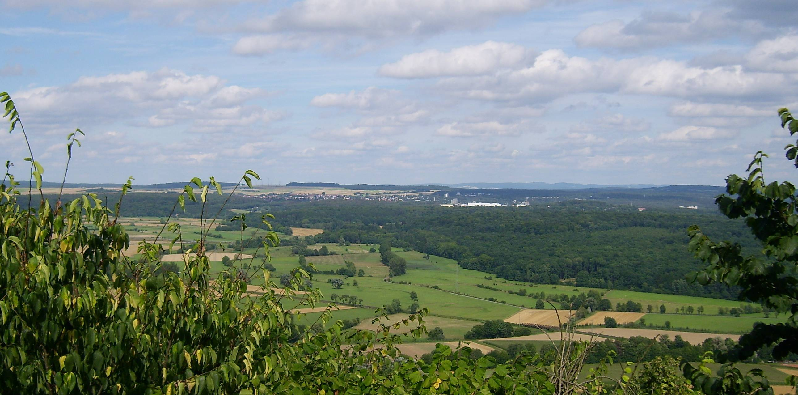 Blick von der 365m hohen Amöneburg auf den Neustädter Sattel (Zentrum der Oberhessischen Schwelle) und den bis 636m hohen Knüll. Unmittelbar links des Sattels der größtenteils gerodete, 346m hohe Krückeberg, der naturräumlich noch zum Sattel gerechnet wird, rechts des Sattels das bis 388m hohe Hochplateau des Nördlichen Vogelsberg-Vorlandes.